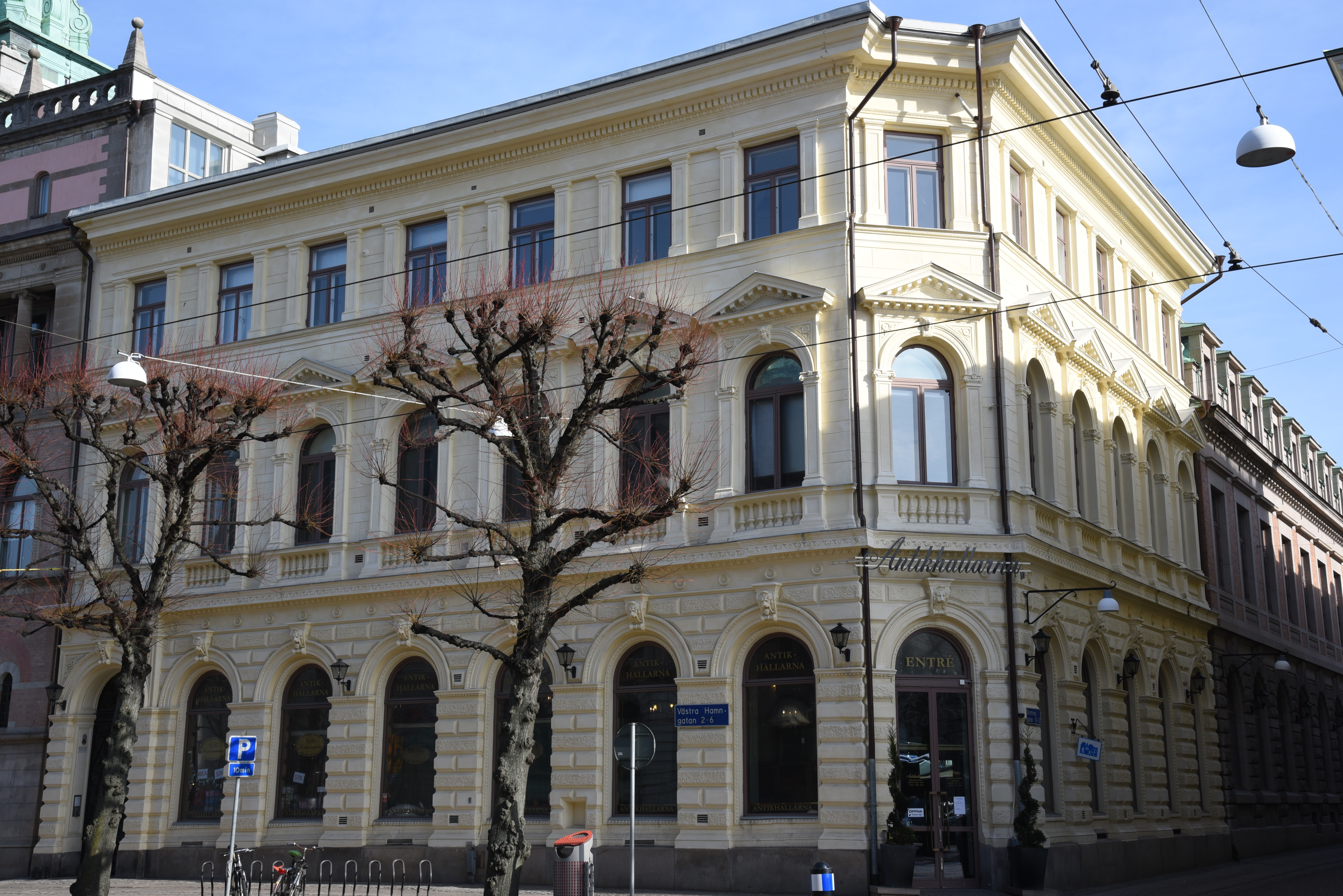 Västra Hamngatan 6 - Drottninggatan 10 i kvarteret Kommerserådet i stadsdelen Inom Vallgraven i Göteborg.Byggnaden uppfördes år 1882 för Svenska Kreditaktiebolaget efter ritningar av Axel och Hjalmar Kumlien. Skandinaviska Enskilda Banken hade sitt kontor där fram till 1974, då kontoret flyttades till Östra Nordstaden. Numera inrymmer byggnaden Antikhallarna.